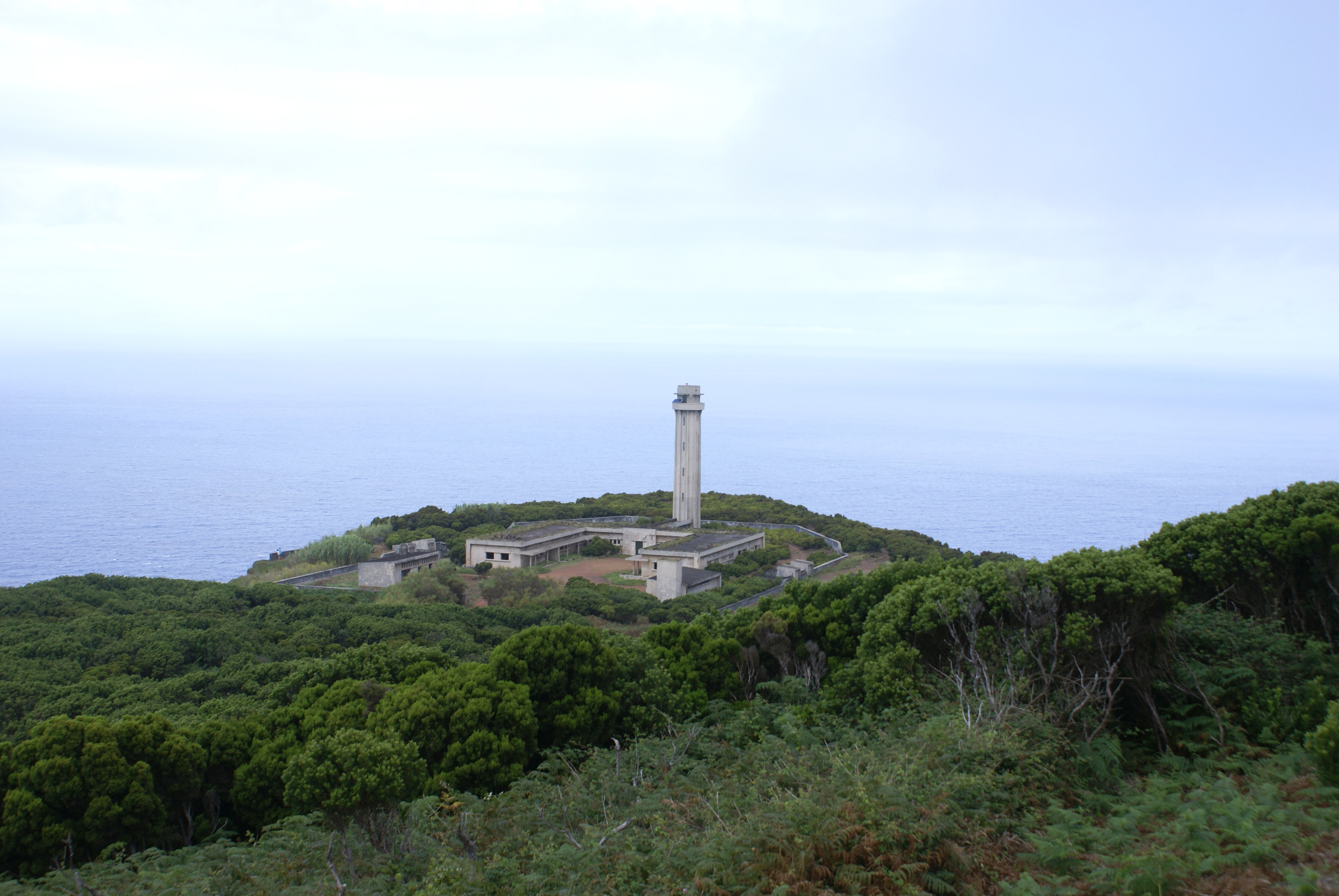 Enquadramento na paisagem do Farol dos Rosias, Rosais, Velas, ilha de São Jorge, Açores